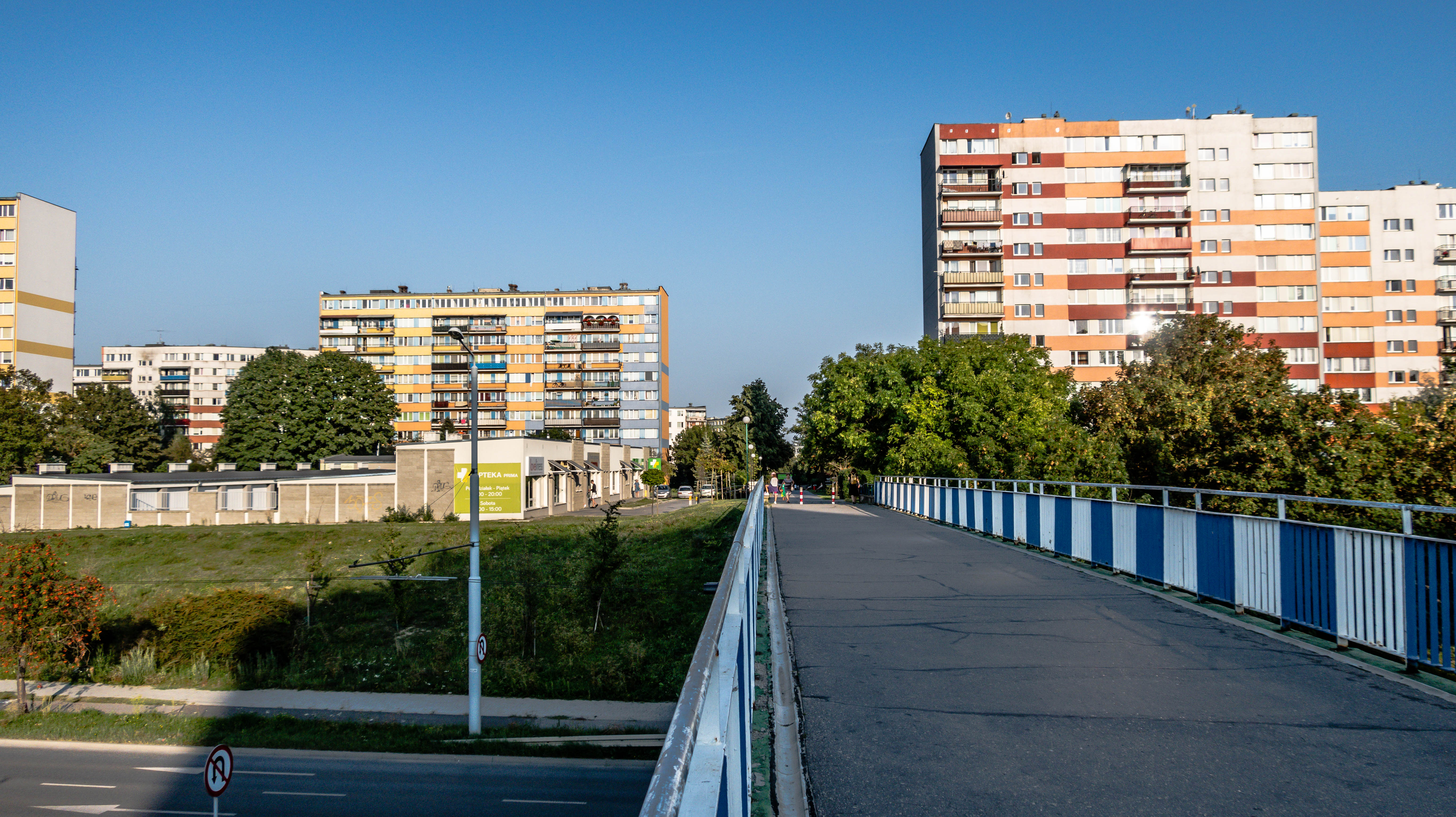 Widok na os.Skarpa od strony ul.Watykańskiej. Po lewej stronie garaże z pawilonami handlowymi wybudowane w 2016r.